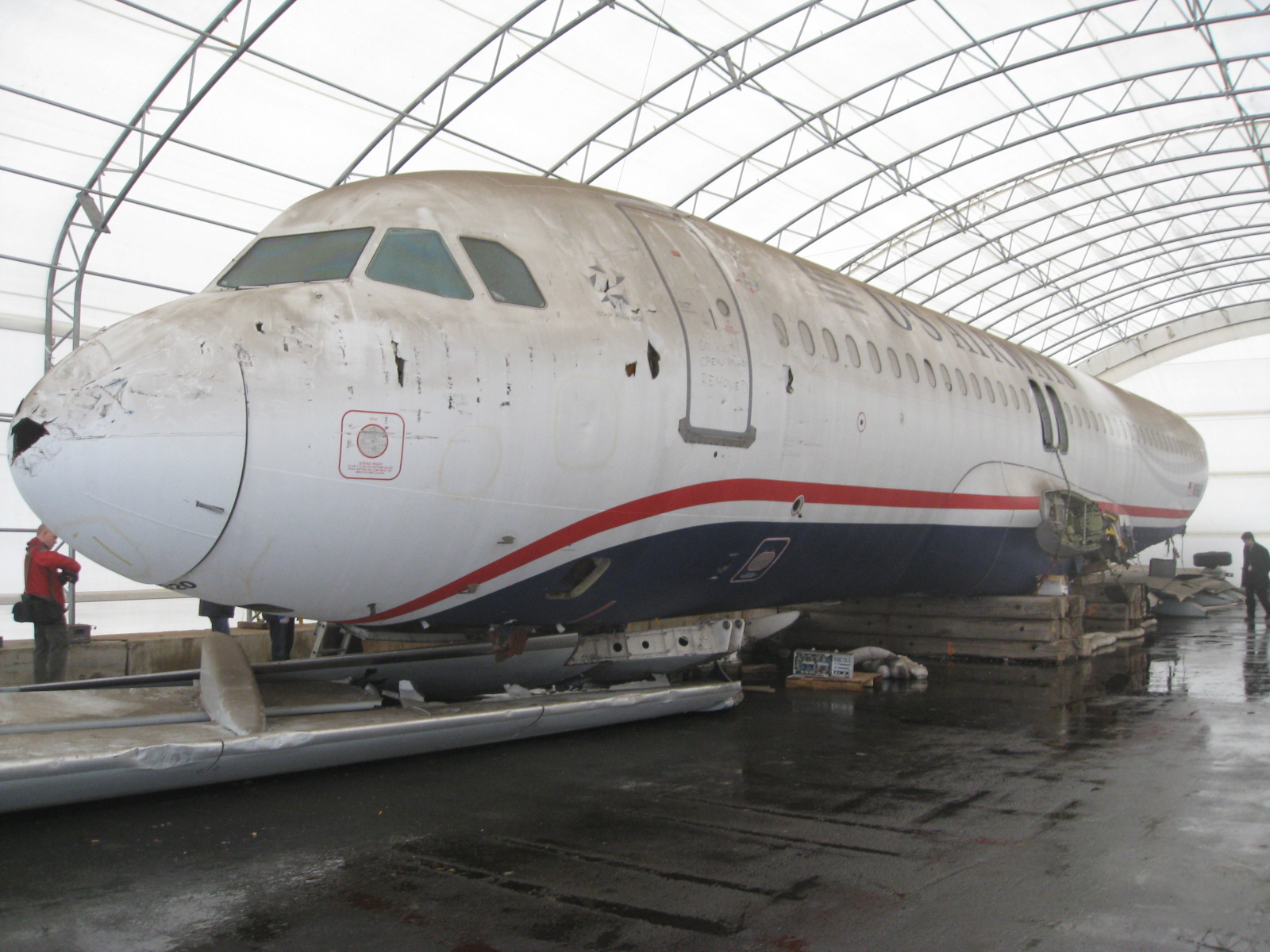 「ハドソン川の奇跡」の事故後の機体「N106US」